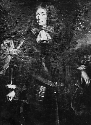 Graf Georg zur Lippe-Brake (* Schloss Brake 21. November 1641; + Holzminden 14. Februar 1703). Braunschweig-Lüneburgischer Generalleutnant und Gouverneur der Festungen Braunschweig und Wolfenbüttel